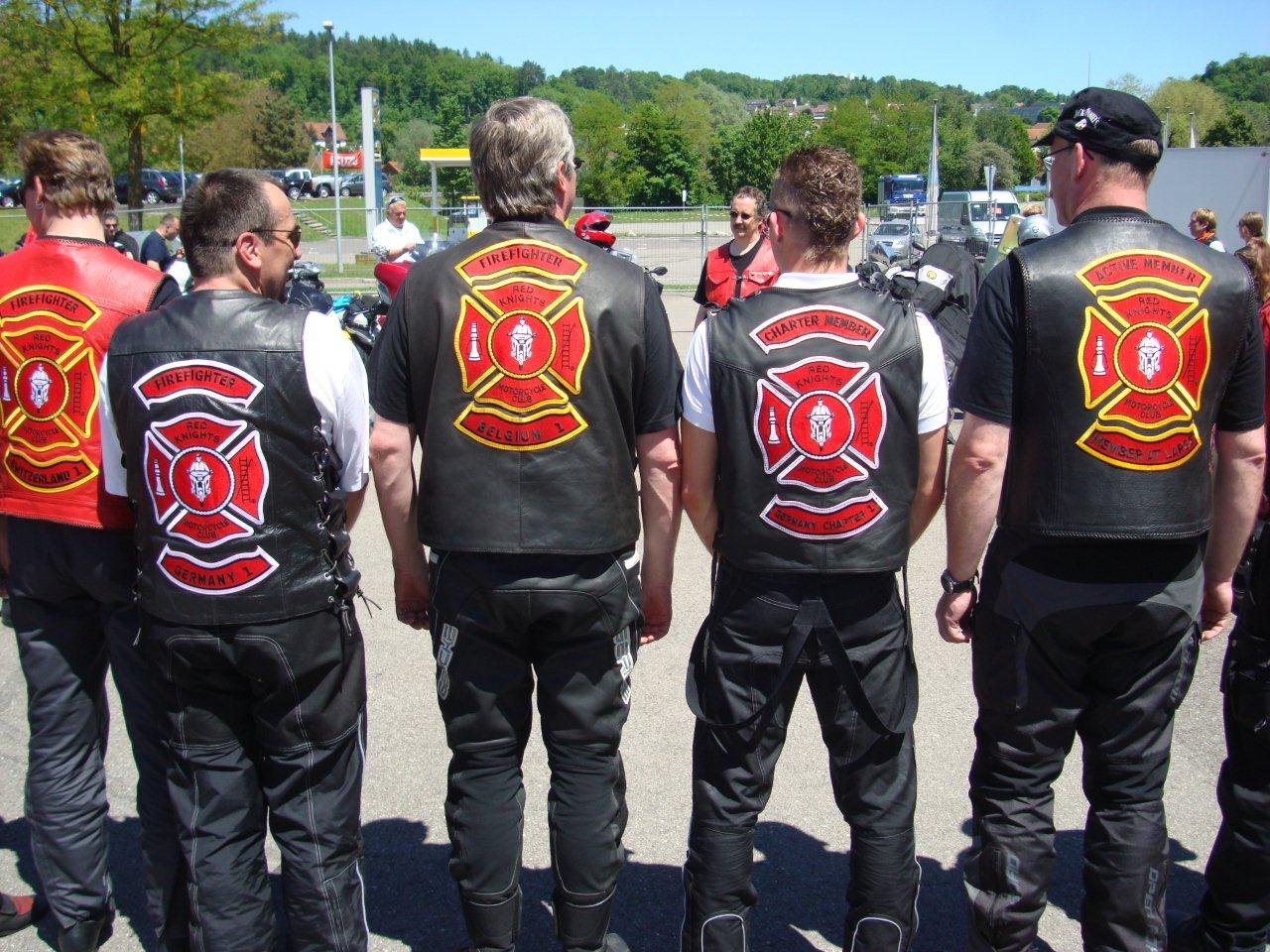 RKMC European members